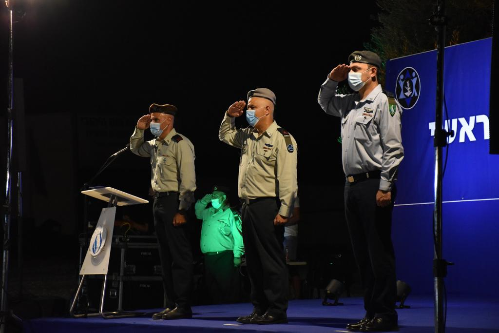 קס חילופי קצין החינוך והנוער הראשי. תת-אלוף אופיר לויוס מחליף בתפקידו את תת-אלוף צביקה פייראיזן אשר כיהן כקצין חינוך ראשי במהלך שלוש השנים האחרונות. תת-אלוף צביקה פייראיזן סיים את שירותו הצבאי לאחר 35 שנות שירות. טקס החילופים נערך במתכנות מצומצמת ב"יד לשריון" בלטרון, במעמד ראש אגף כוח האדם, אלוף מוטי אלמוז, מפקדים, בני משפחה ומוזמנים נוספים.